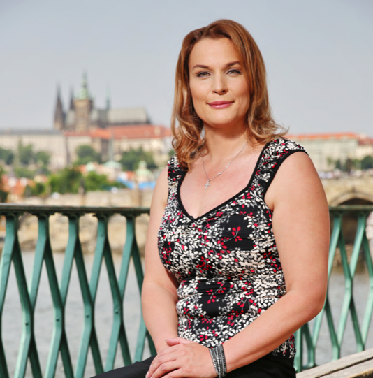 Petra Venturová, předsdkyně Politické hnutí Pro Prahu